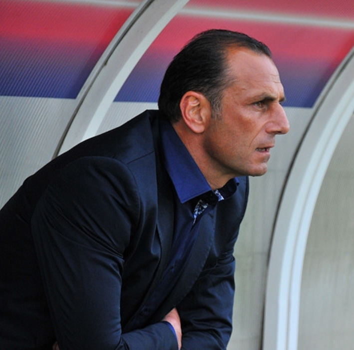 Michel Der Zakarian, entraineur de football.